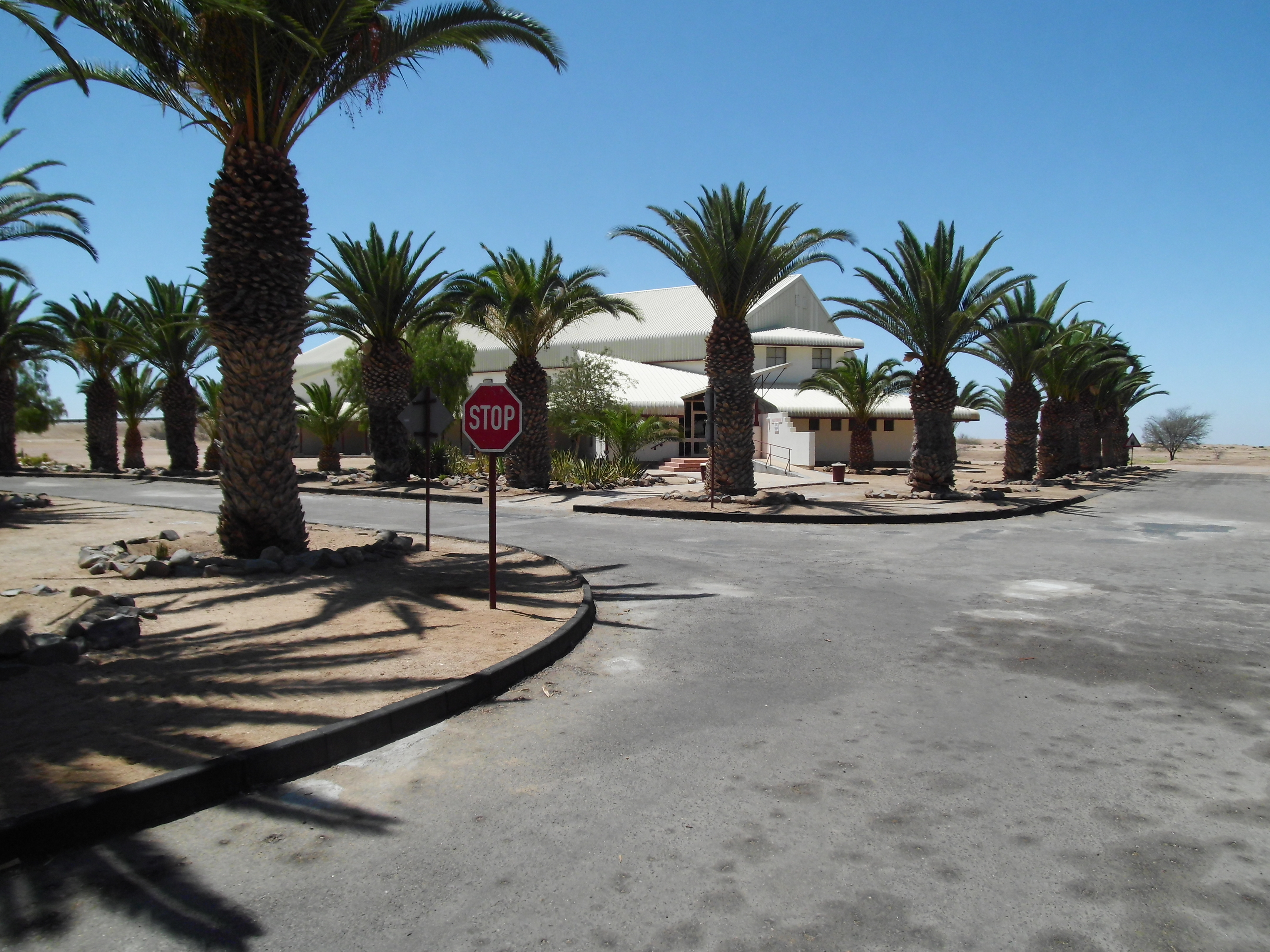 Namibia Institute of Mining and Technology